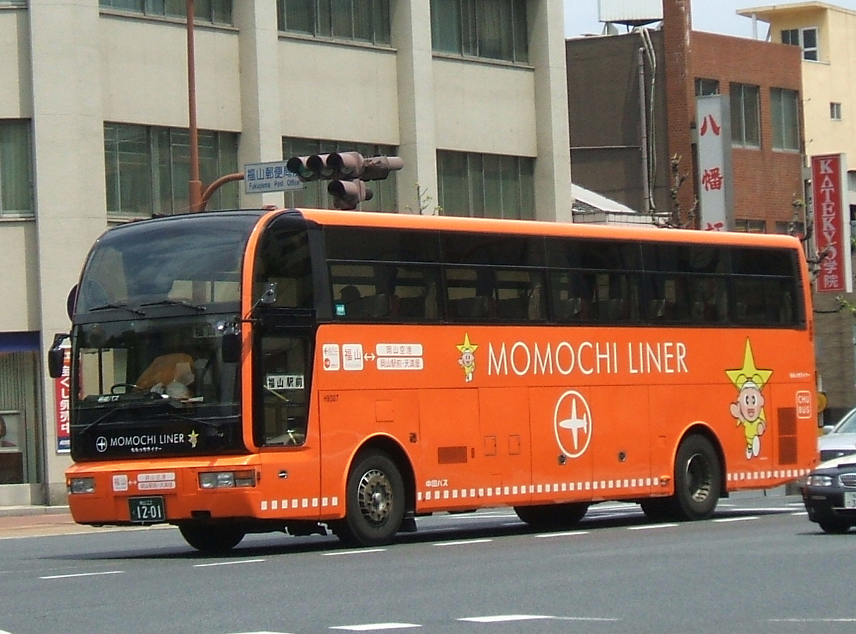 広島県福山市と岡山空港の間で運行されていた高速バス「ももっちライナー」2008年1月に廃止